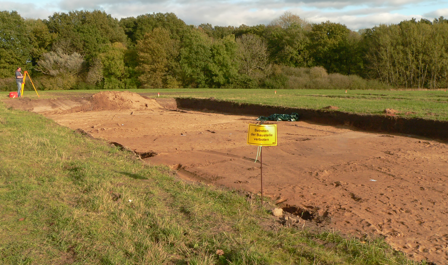 Ur- und frühgeschichtlicher Siedlungsplatz Lemke, Ausgrabungsfläche